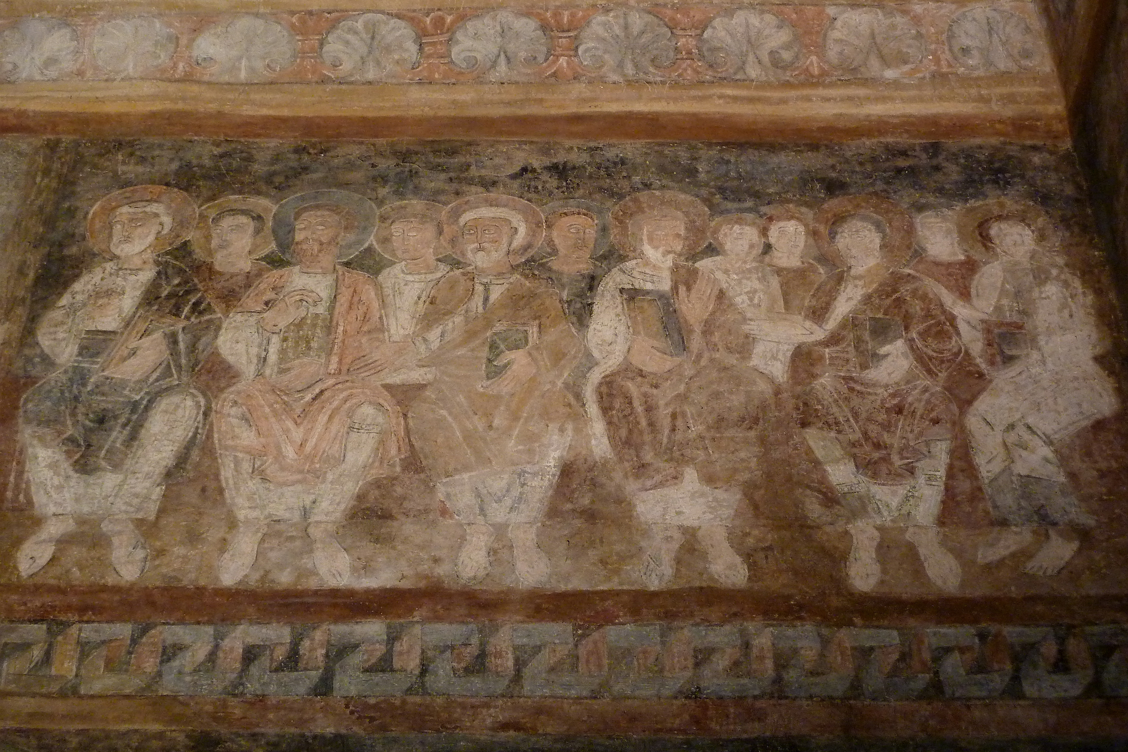 Ehemalige Abteikirche Saint-Theudère in Saint-Chef, einer Gemeinde im Département Isère in der französischen Region Rhône-Alpes, romanisches Fresko an der Südseite der Chapelle des Anges, Darstellung: zwölf Apostel, in der Mitte Petrus